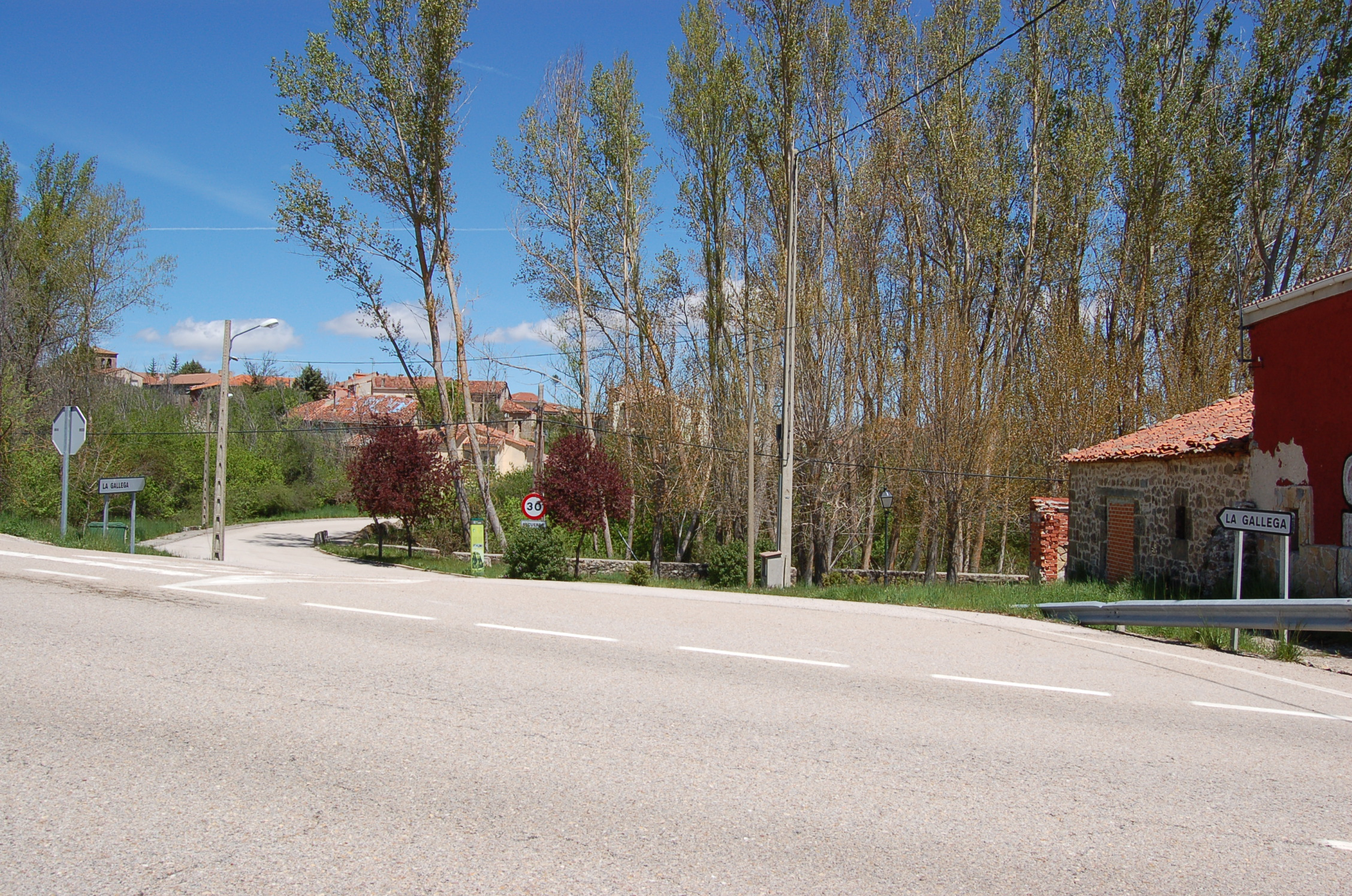 Entrada a La Gallega desde la carretera N-234